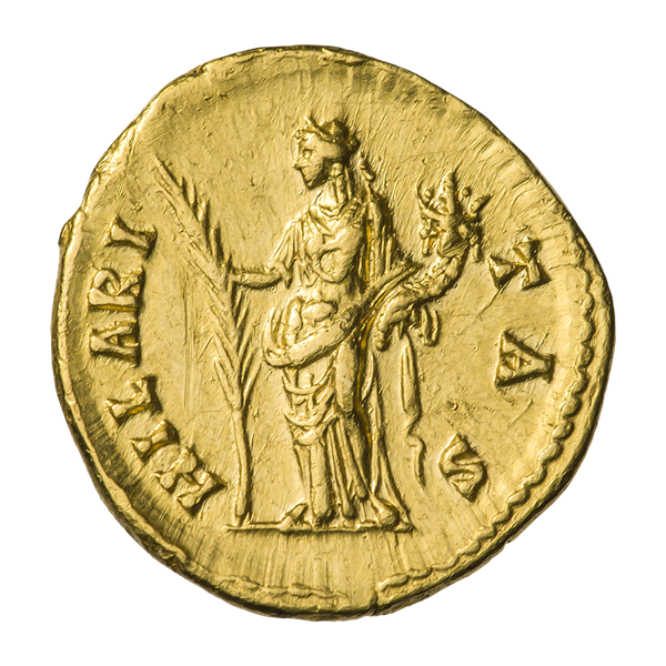 Марк Аврелий, цезарь (139—161). Ауреус. Ок. 145—147 гг. Чеканка в правление Антонина Пия (138—161). Рим. Реверс. Надпись HILARITAS. Хиларита (персонификация веселости) стоит, влево; в руках пальмовая ветвь и рог изобилия.